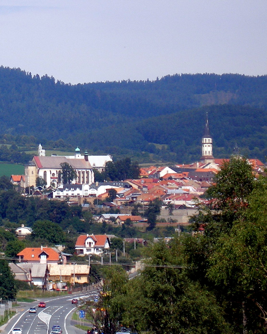 Levoča bývalé kráľovské mesto, okres Levoča región Spiš